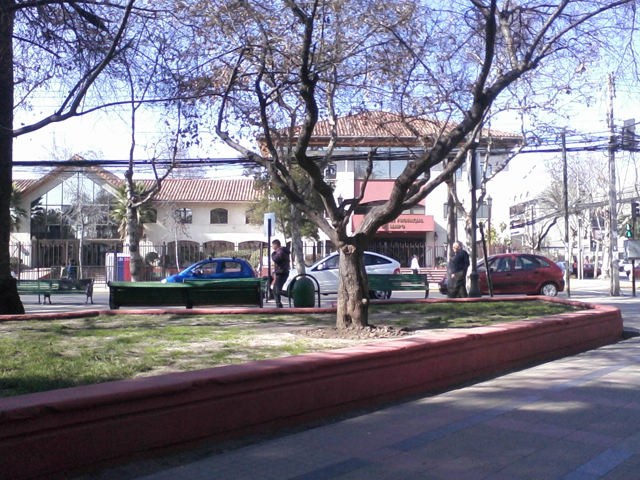 Gobernacion del maipo en la Ciudad de San Bernardo , Chile